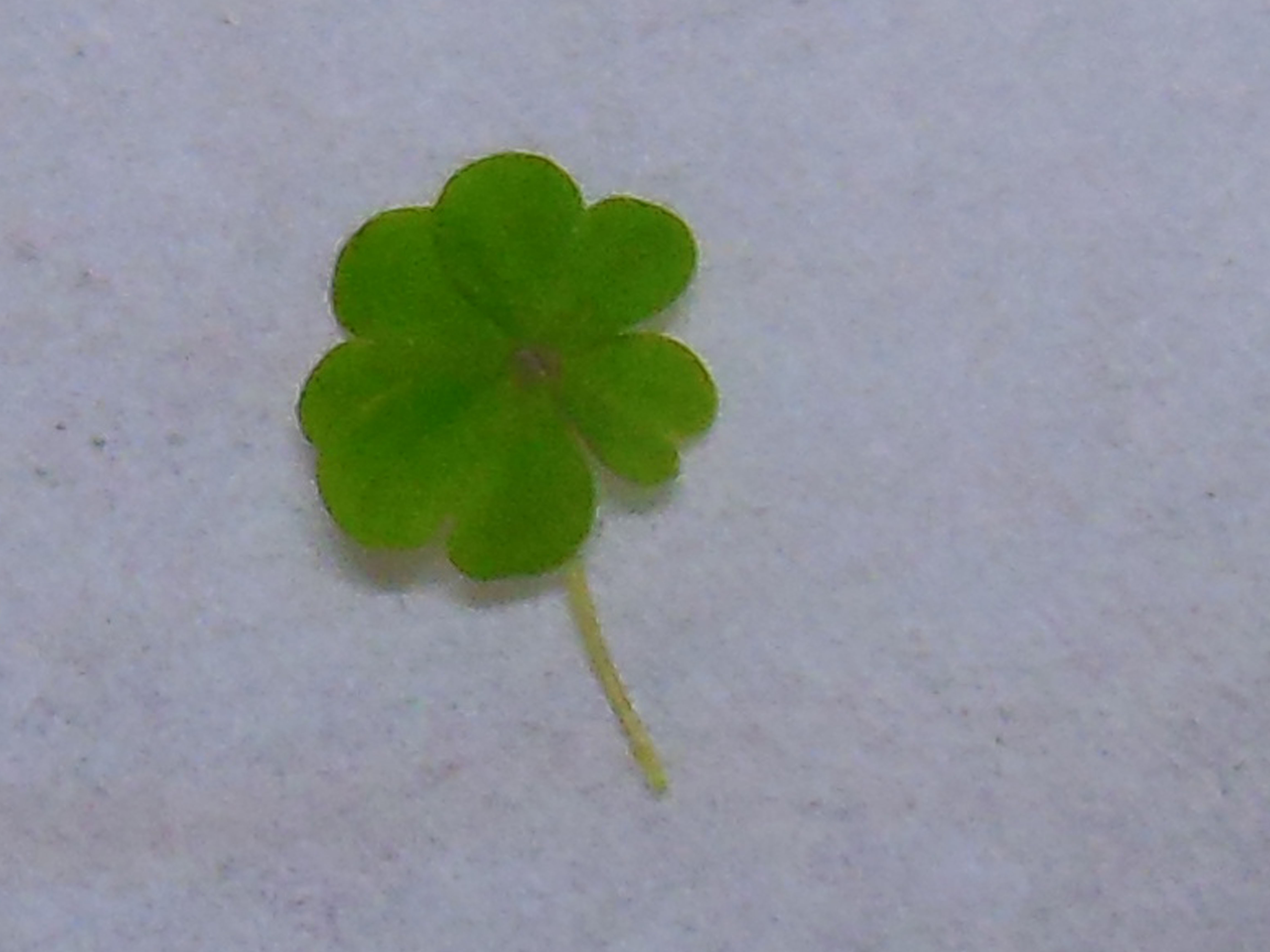 酢漿草の四つ葉